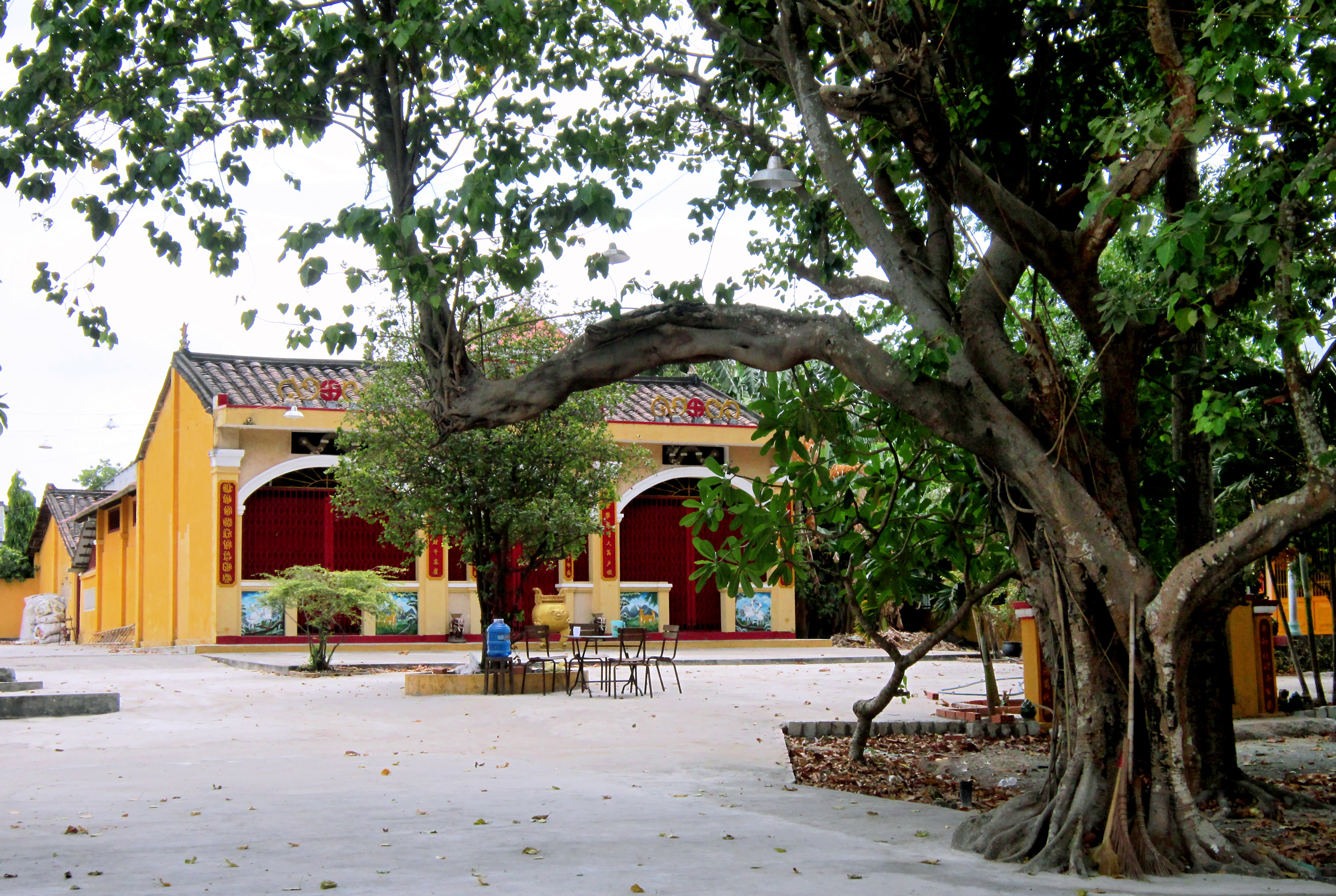 Đình thần Bình Đức ở phường Tam Phú, quận Thủ Đức, TP. Hồ Chí Minh, Việt Nam.